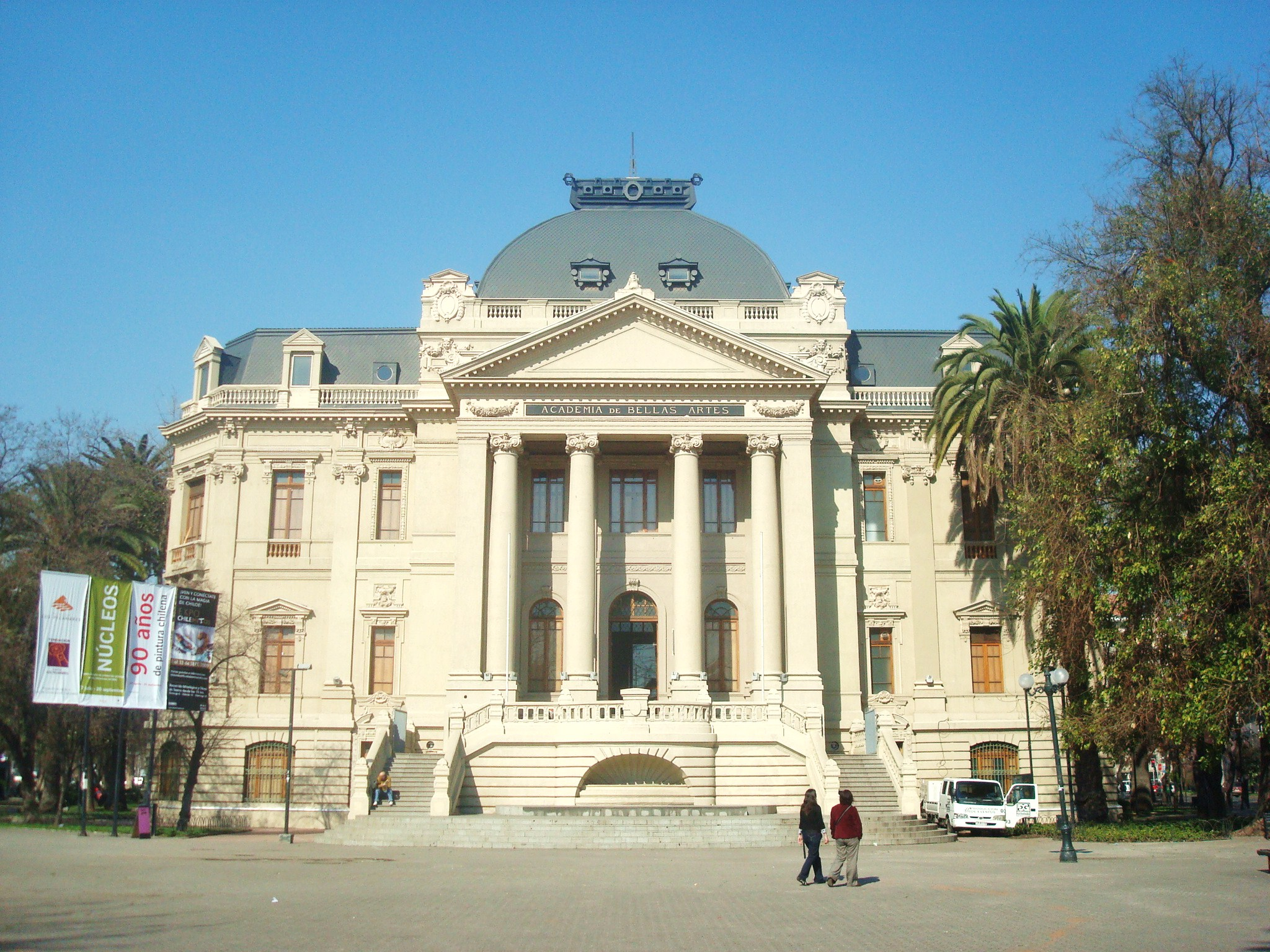 Museo de Arte Contemporáneo, Parque Forestal, Santiago de Chile